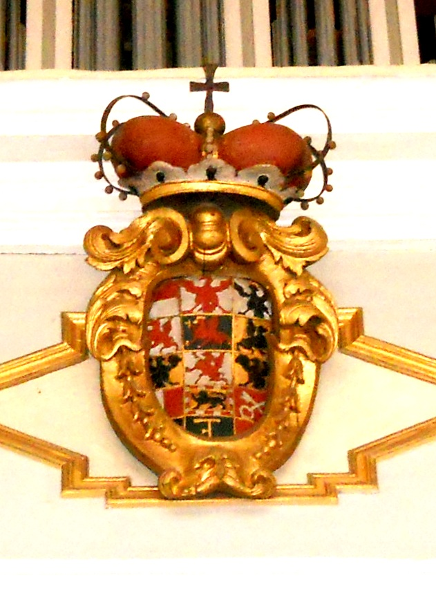 Laubenzedel, Ortsteil von Gunzenhausen im Landkreis Weißenburg-Gunzenhausen (Bayern), Evang.-luth. Pfarrkirche St. Sixtus, Markgrafen-Wappen an der Empore